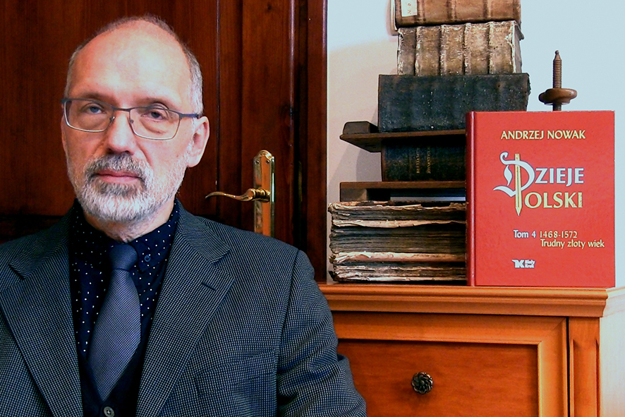 Der polnische Historiker Andrzej Nowak mit seinem Lebenswerk "Dzieje Polski" (Die Geschichte Polens)